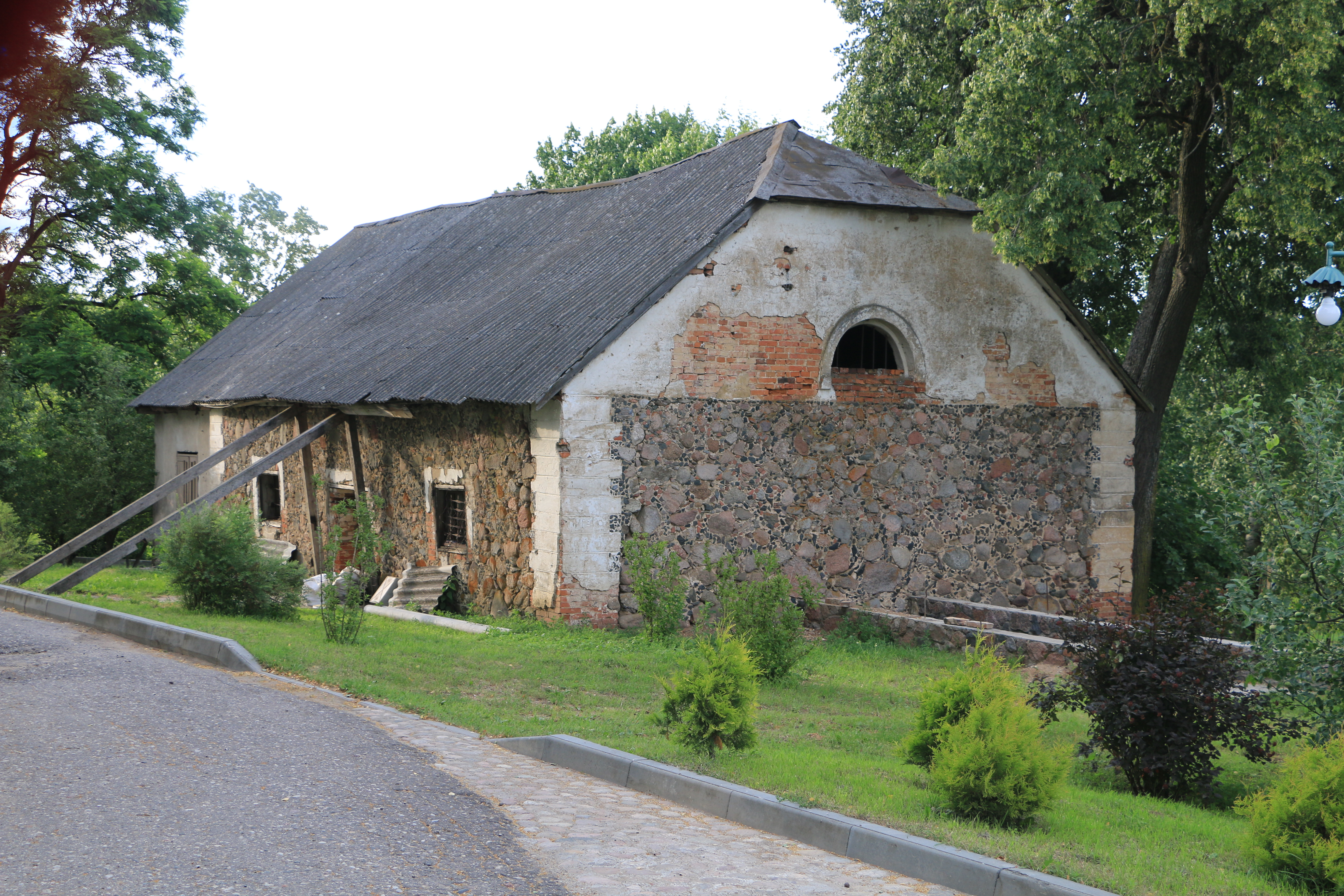 Radzivilki, Belarus